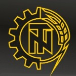 Емблема Соціал-Національних Профспілок України.